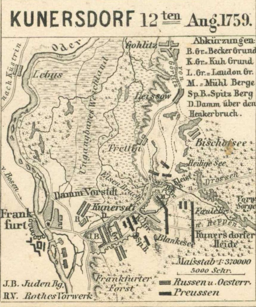 Schlachtplan von Kunersdorf